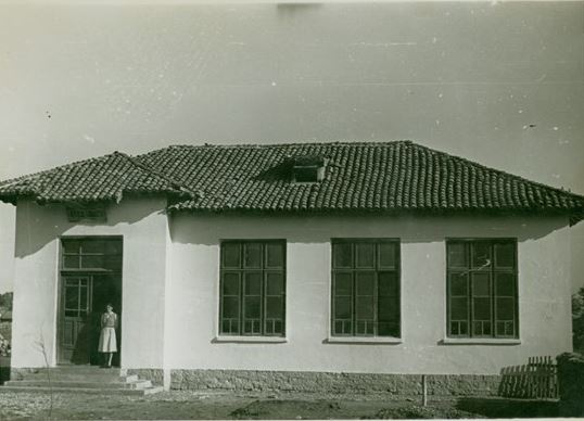 Народно начално училище „Отец Паисий“ в село Могилище, Добричко.